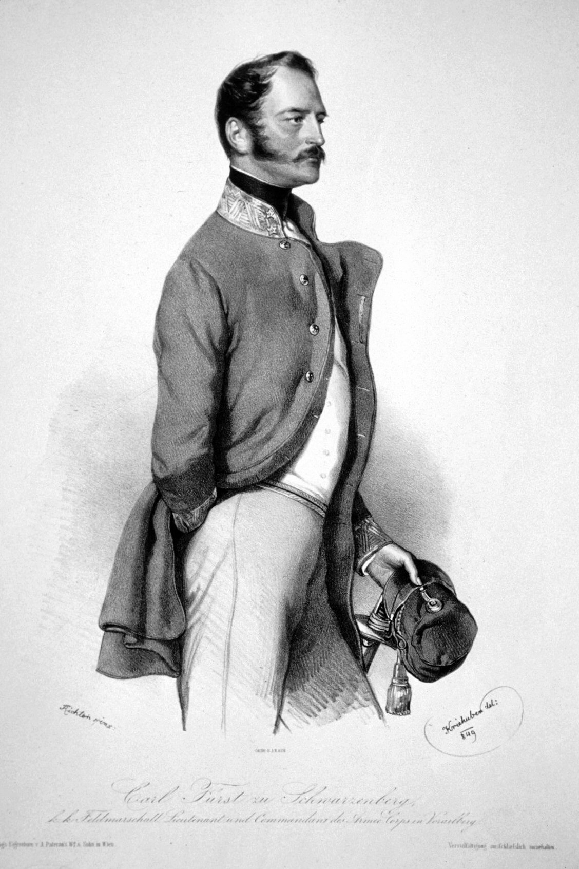 Karl II. Fürst zu Schwarzenberg (1802-1857), FZM, Vliesritter. Lithographie von Josef Kriehuber, 1849